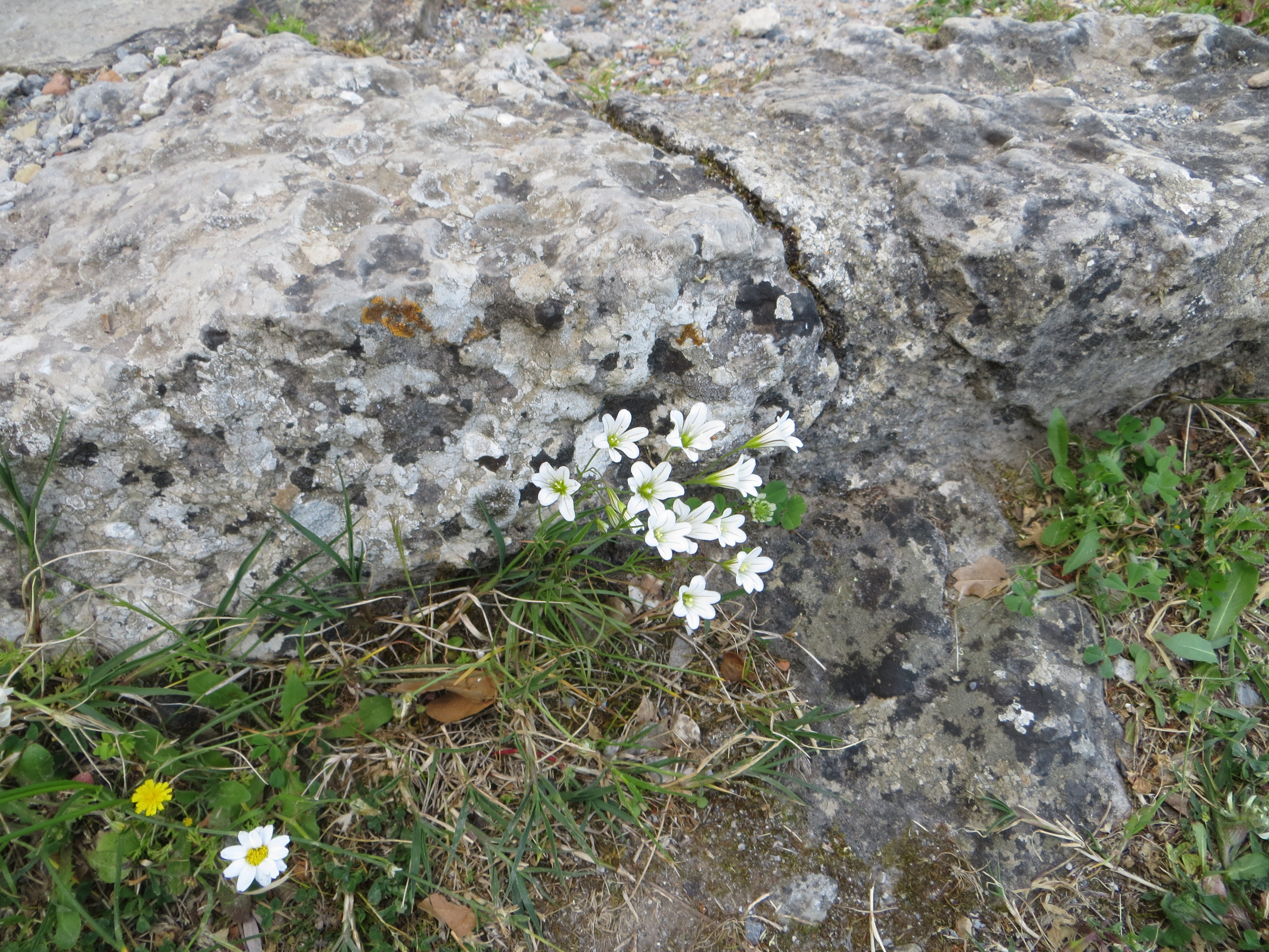 Plante photographiée dans la ville fortifiée de Mystra (Grèce)